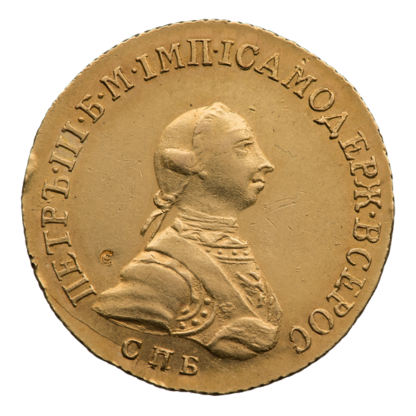 Пять рублей 1762 г. (аверс). ГМ 2.I.2; Биткин 3 (R1). Профильный портрет императора, вправо. На голове парик с косой, перевязанной лентой. Бюст в кирасе с орлом на груди в императорской мантии. Через правое плечо надета Андреевская лента. Круговая надпись: ПЕТРЪ∙III∙Б∙М∙IМП∙IСАМОДЕРЖ∙ВСЕРОС. Под бюстом обозначение монетного двора: СПБ